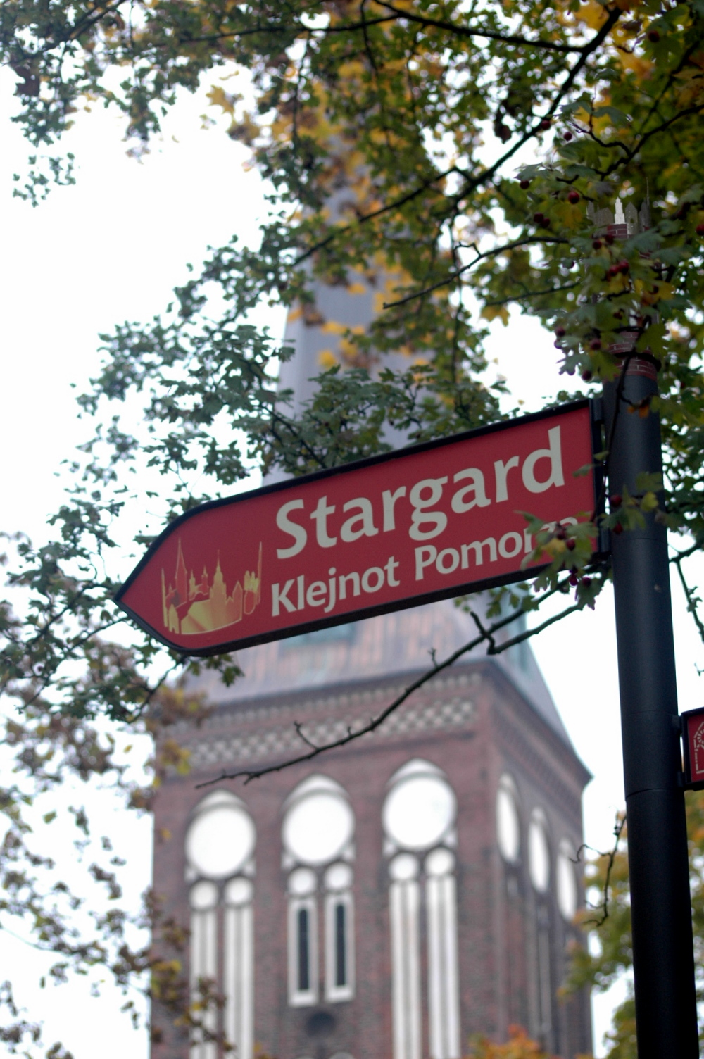 Klejnot Pomorza - szlak turystyczny w Stargardzie Szczecińskim (cz. Europejskiego Szlaku Gotyku Ceglanego). W tle widoczny Kościół św. Jana.